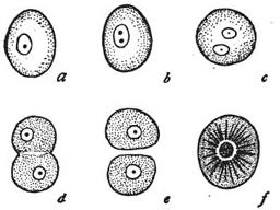 Podział komórki wg Remaka [25].